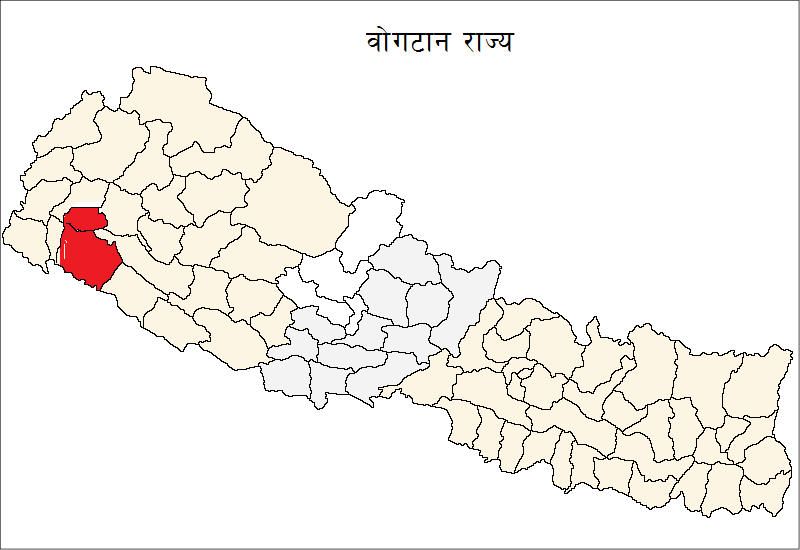 नेपाली: Map of Bogatan